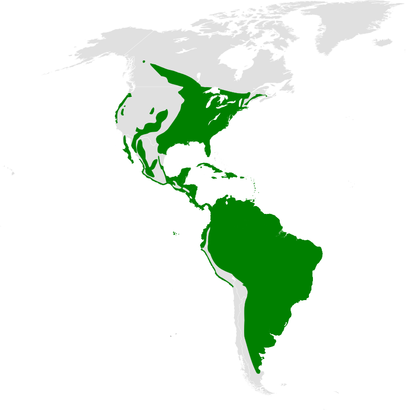 Progne distribution map